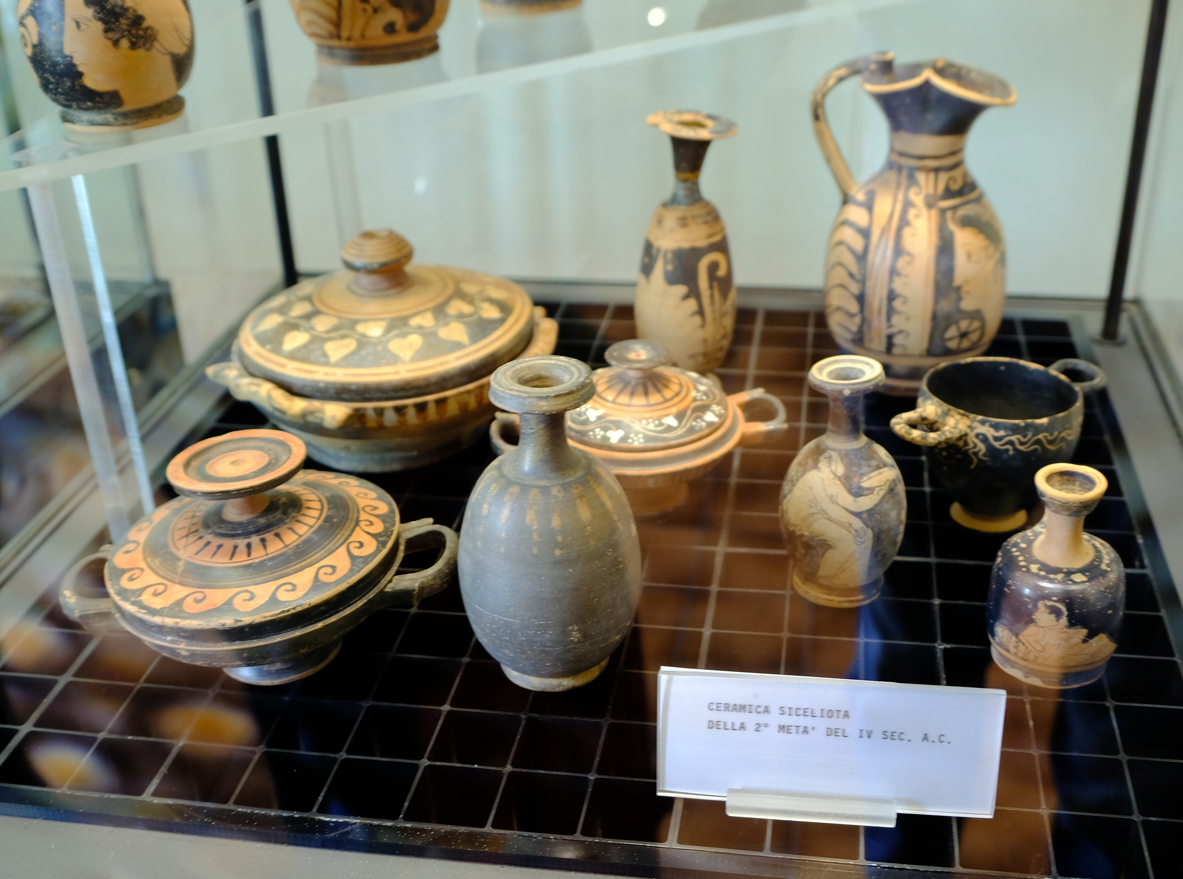 Ceramica siceliota 2a metà del IV sec a.C